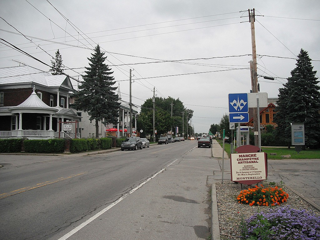 Vue sur le centre de Montebello, en Outaouais, à partir de la route 148 direction est (rue Notre-Dame).